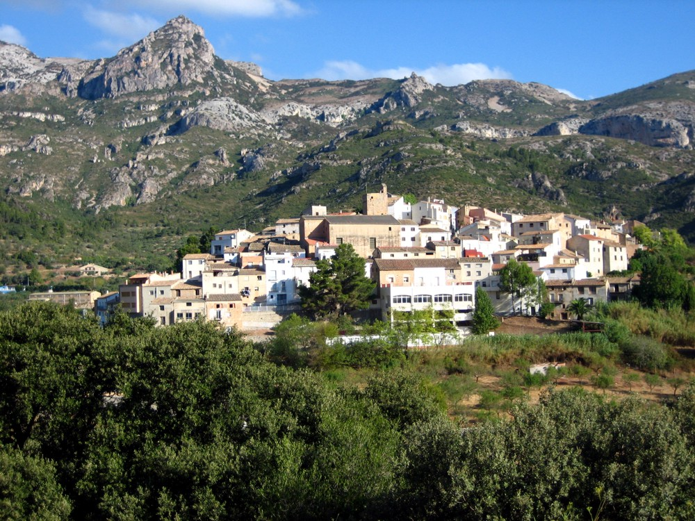 Vista general d'Alfara de Carles